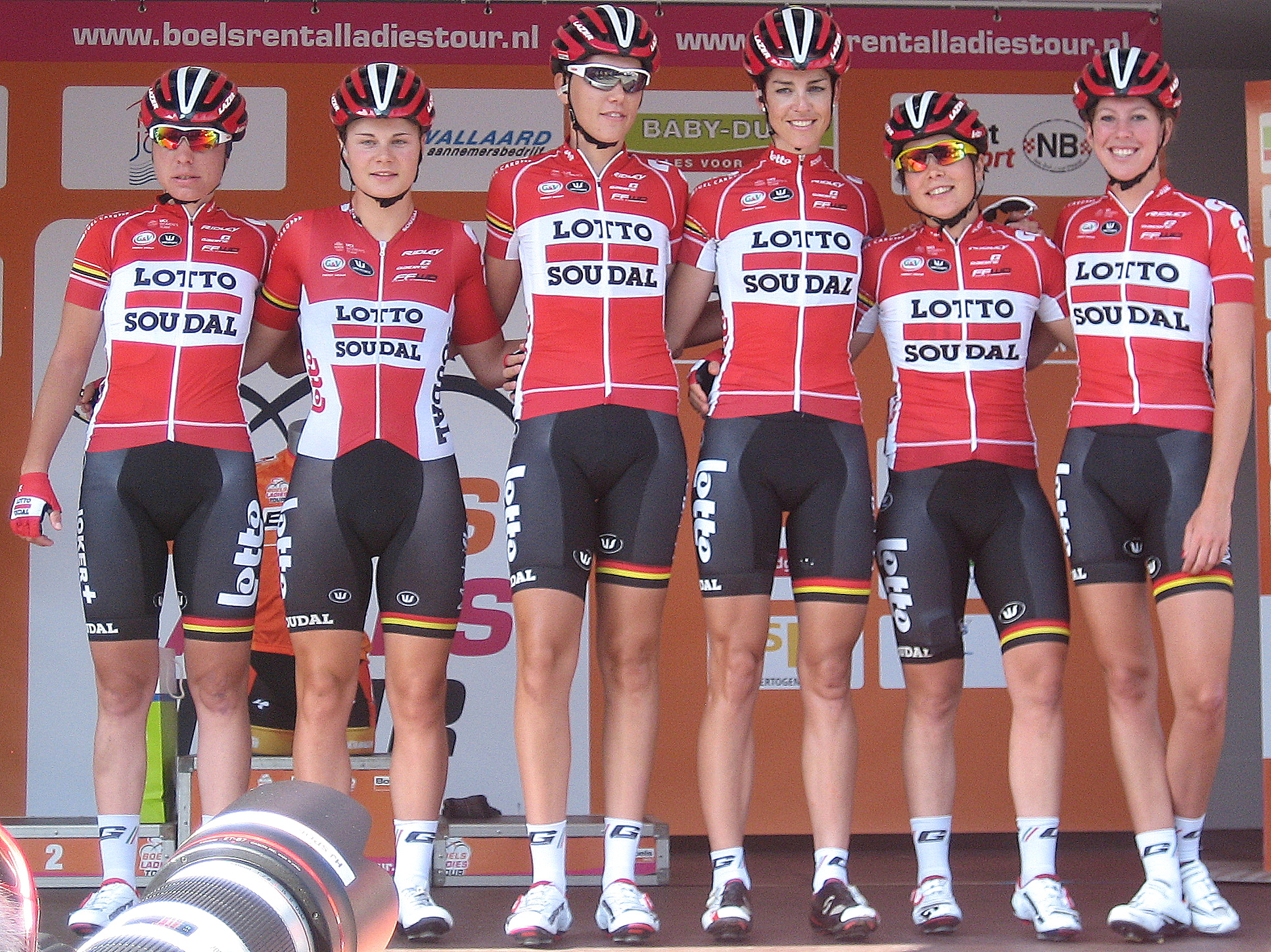 Team Lotto Soudal Ladies voor start 3e etappe Holland Ladies Tour 2016